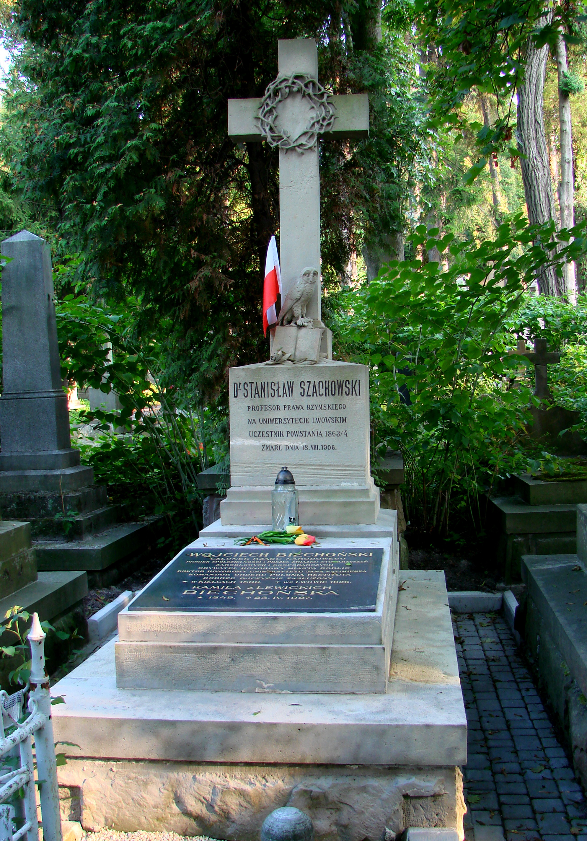 Надгробок С. Шаховського.Личаківський цвинтар , поле № 59.